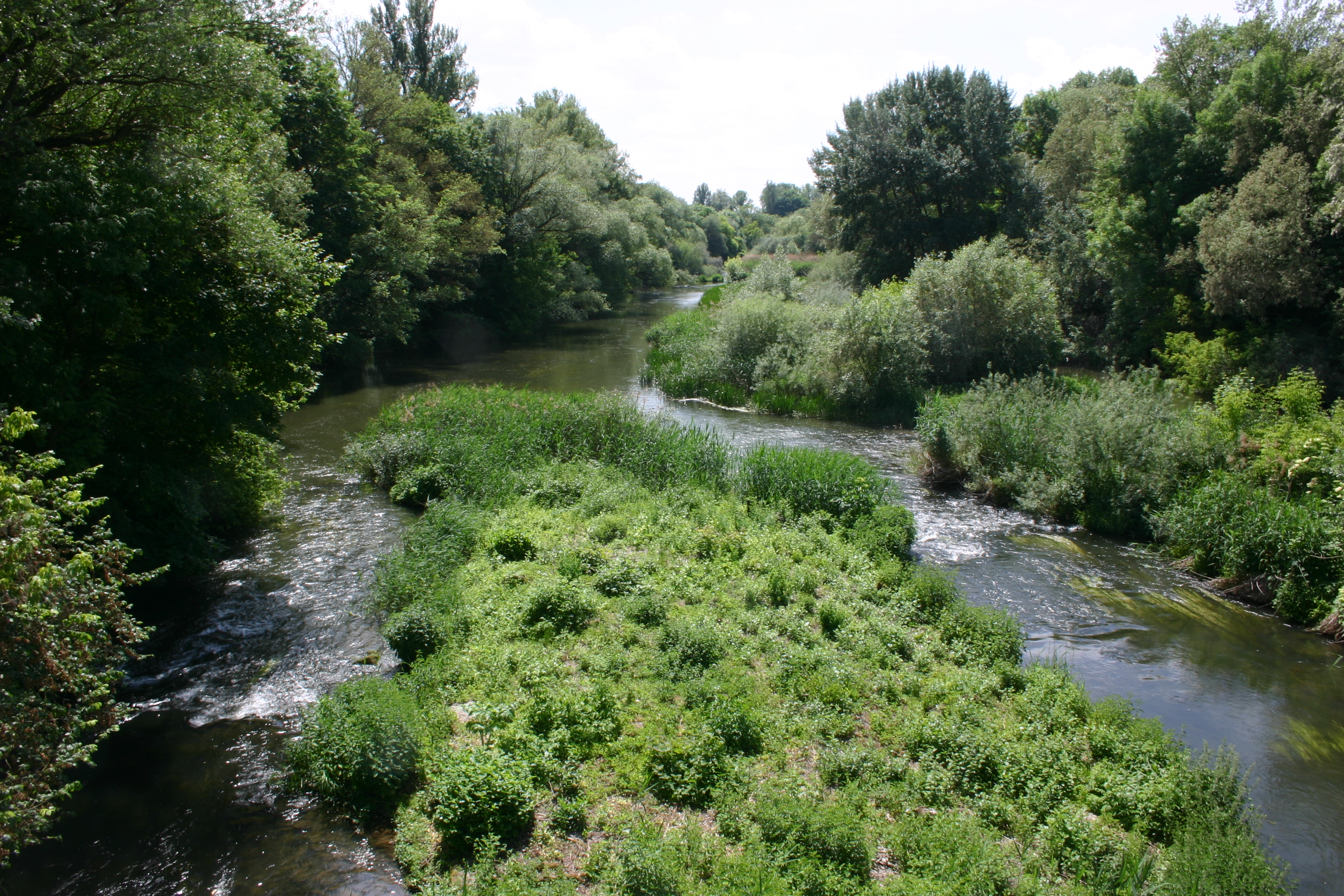 Blick von der Marienbrücke ins Naturschutzgebiet „Saumain in der Stadt Schweinfurt“ (NSG 00458.01) in Schweinfurt: Eine Schilfinsel umgeben vom Flachwasser des Main-Seitensarms. Natürlicher Lebensraum für Tiere und Pflanzen.